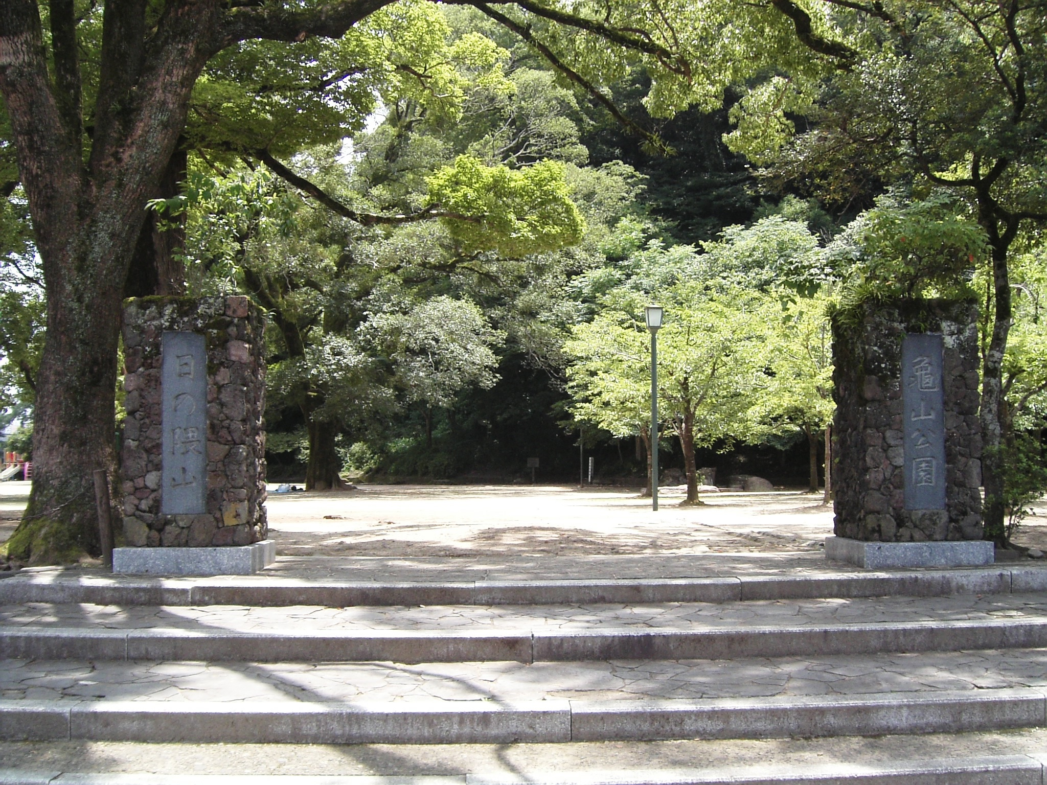 日田市「日ノ隈山亀山公園」